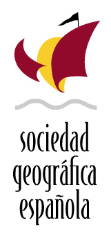 Logo de la Sociedad Geográfica Española